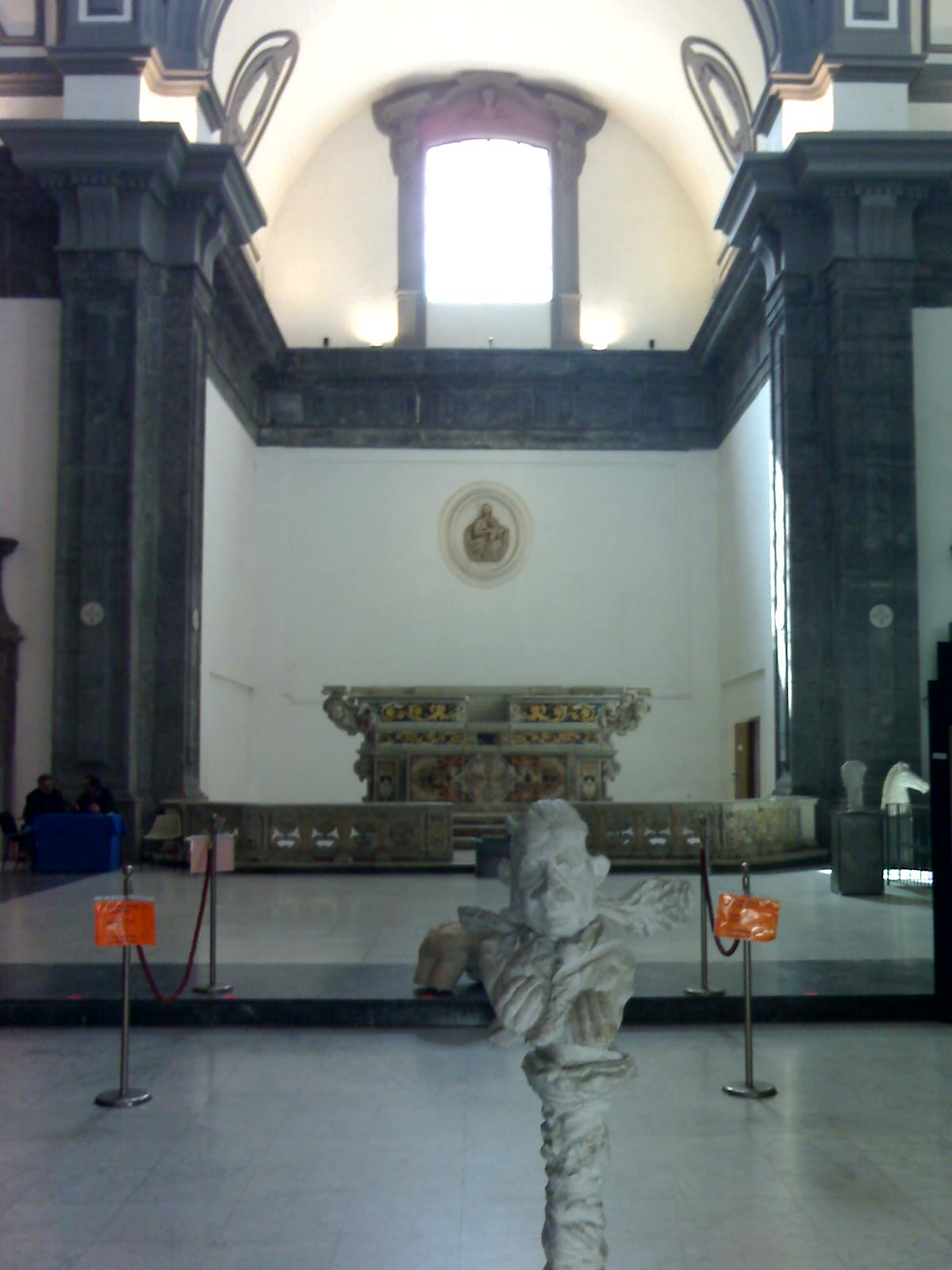 Chiesa di San Severo al Pendino (Napoli) - La navata